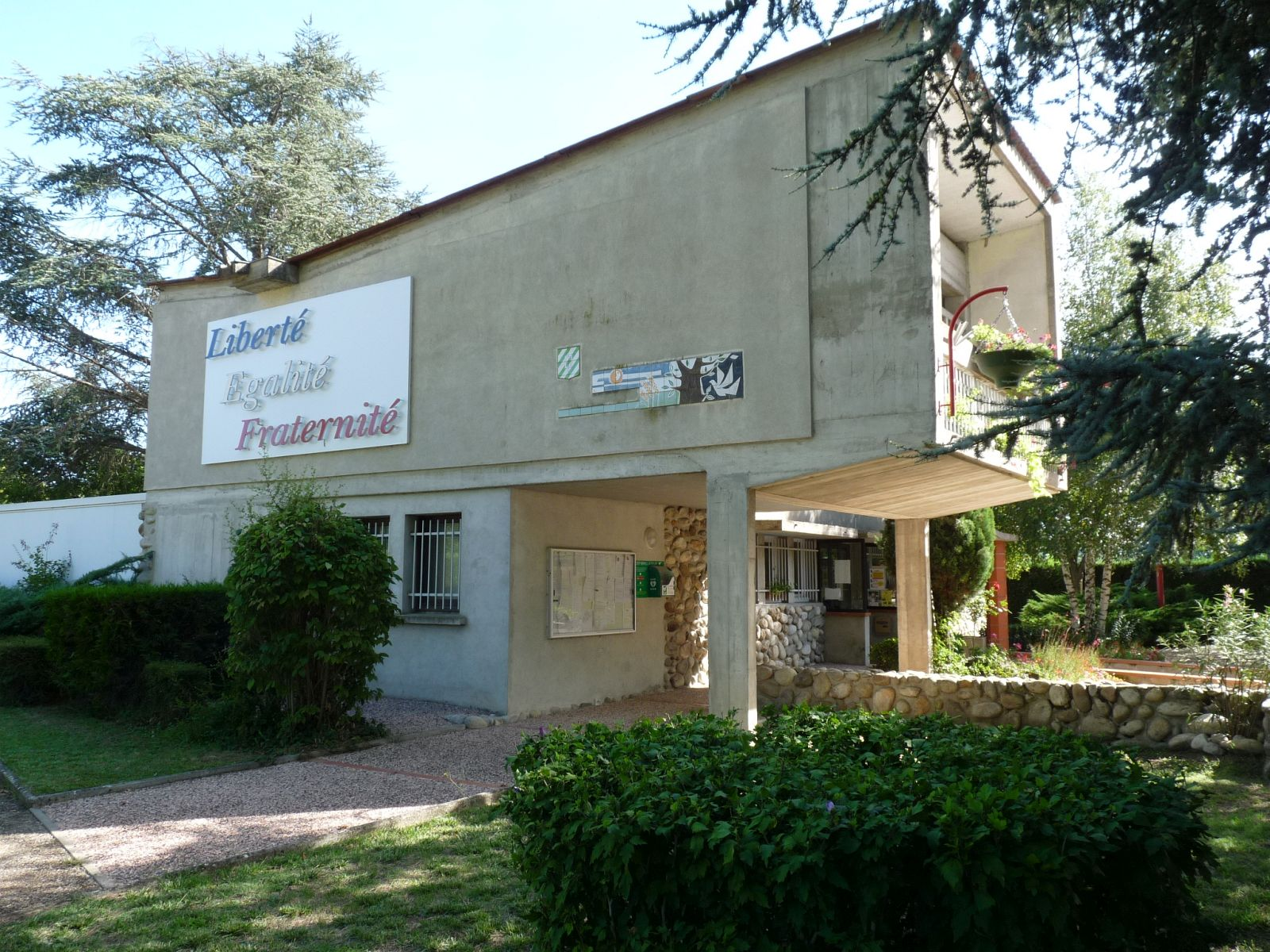 Mairie de Calmont, Haute-Garonne, France